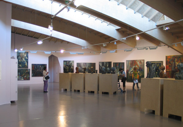 Museum de Buitenplaats in Eelde (The Netherlands) Interior